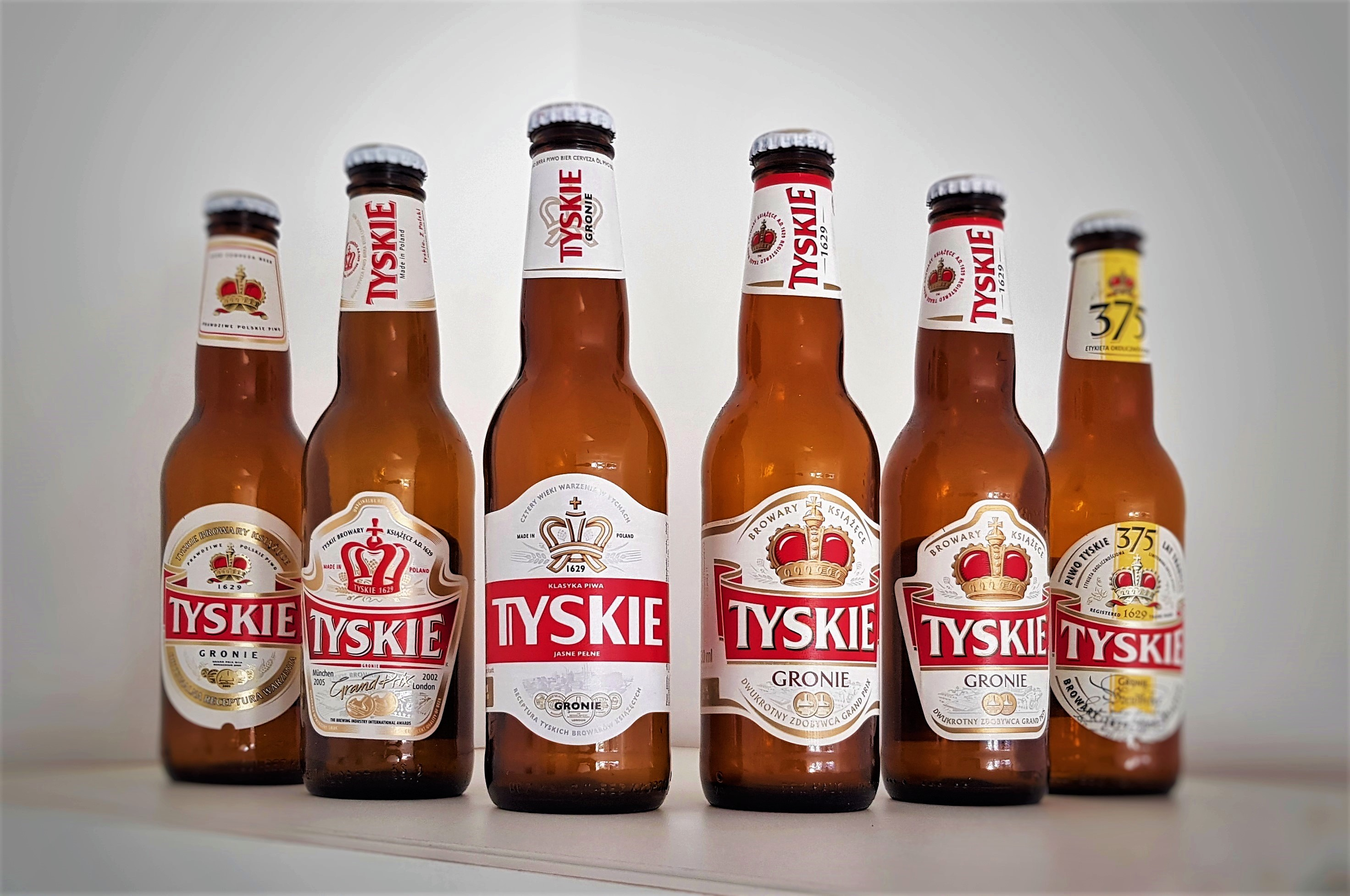 Frühere und aktuelle Flaschendesigns der polnischen Biermarke Tyskie aus den Jahren 2000 bis 2019.